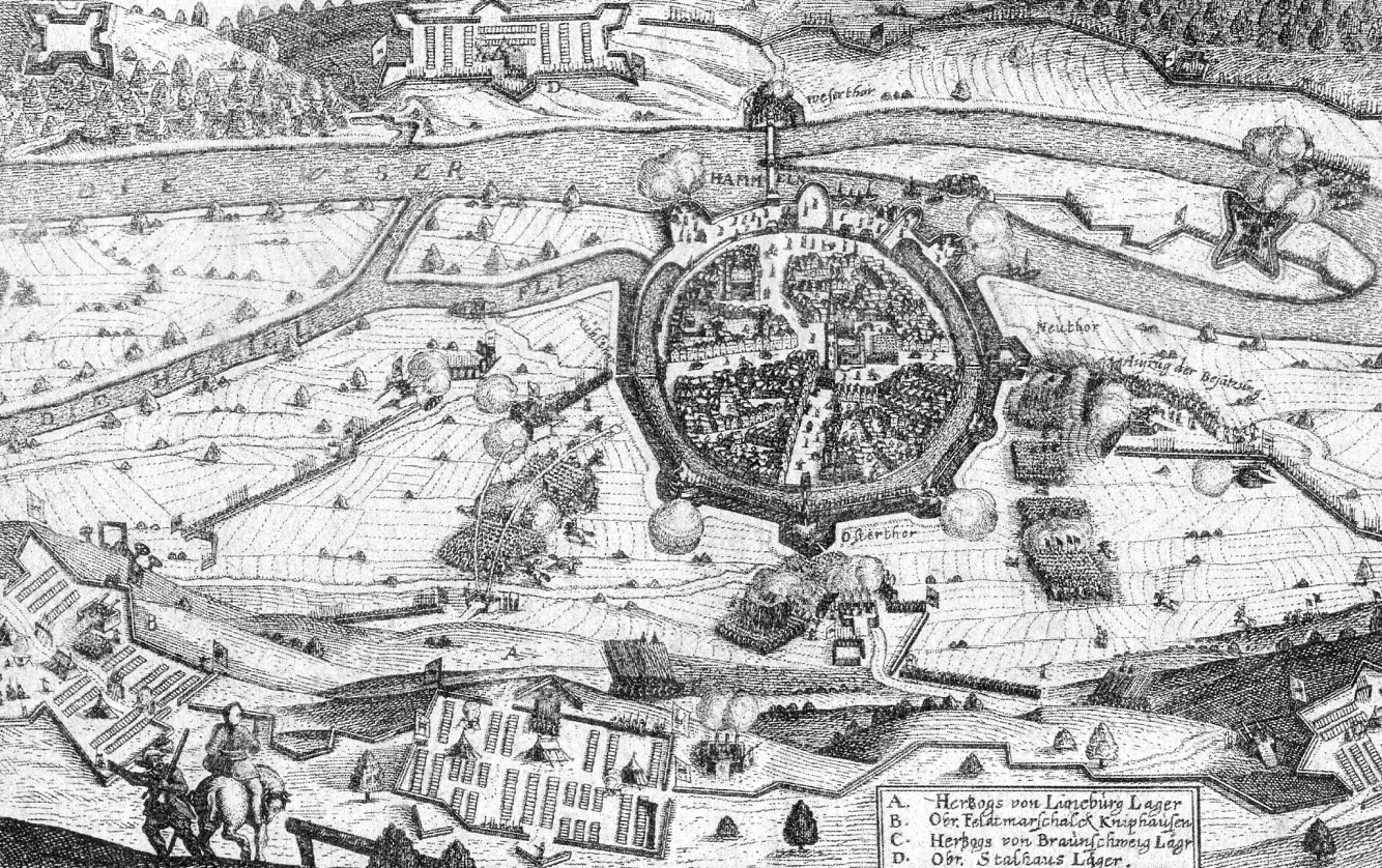 Belagerung Hameln 1633